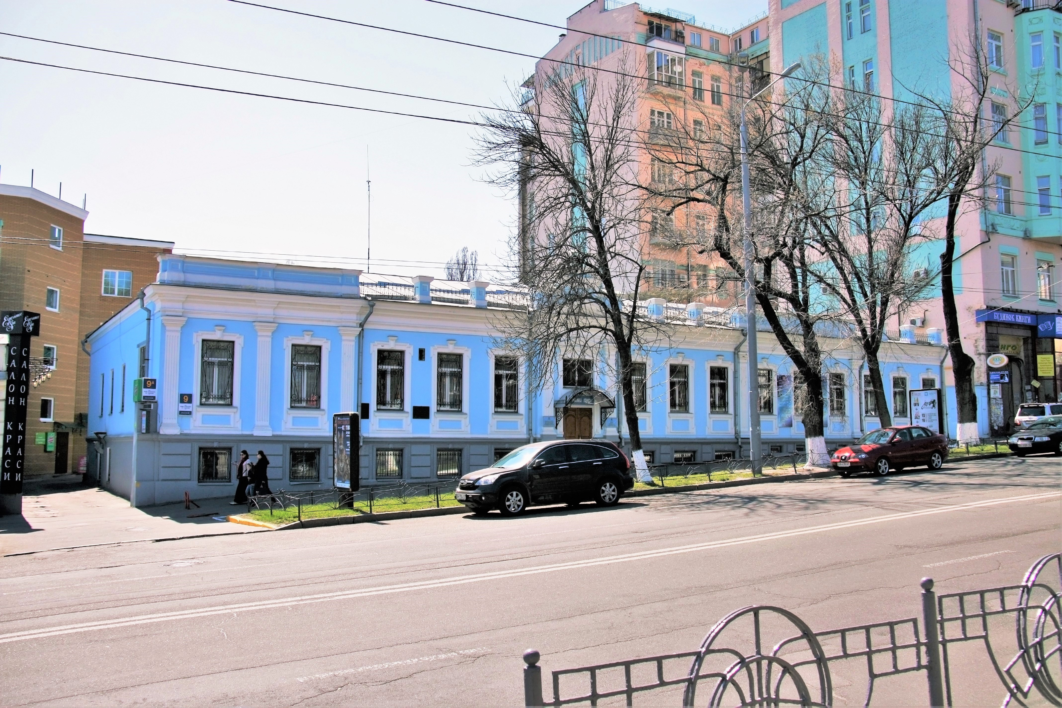 Будинок, в якому у 1879 р. у родині Кузьмінських зупинявся Толстой Л. М., російський письменник, Київ, Толстого Льва вул., 9